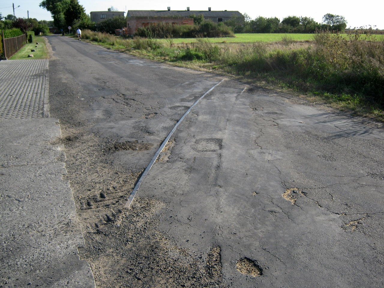 Resztki przejazdu kolejowego w Grzybowie. W ciągu drogi Mierzewo- Grzybowo